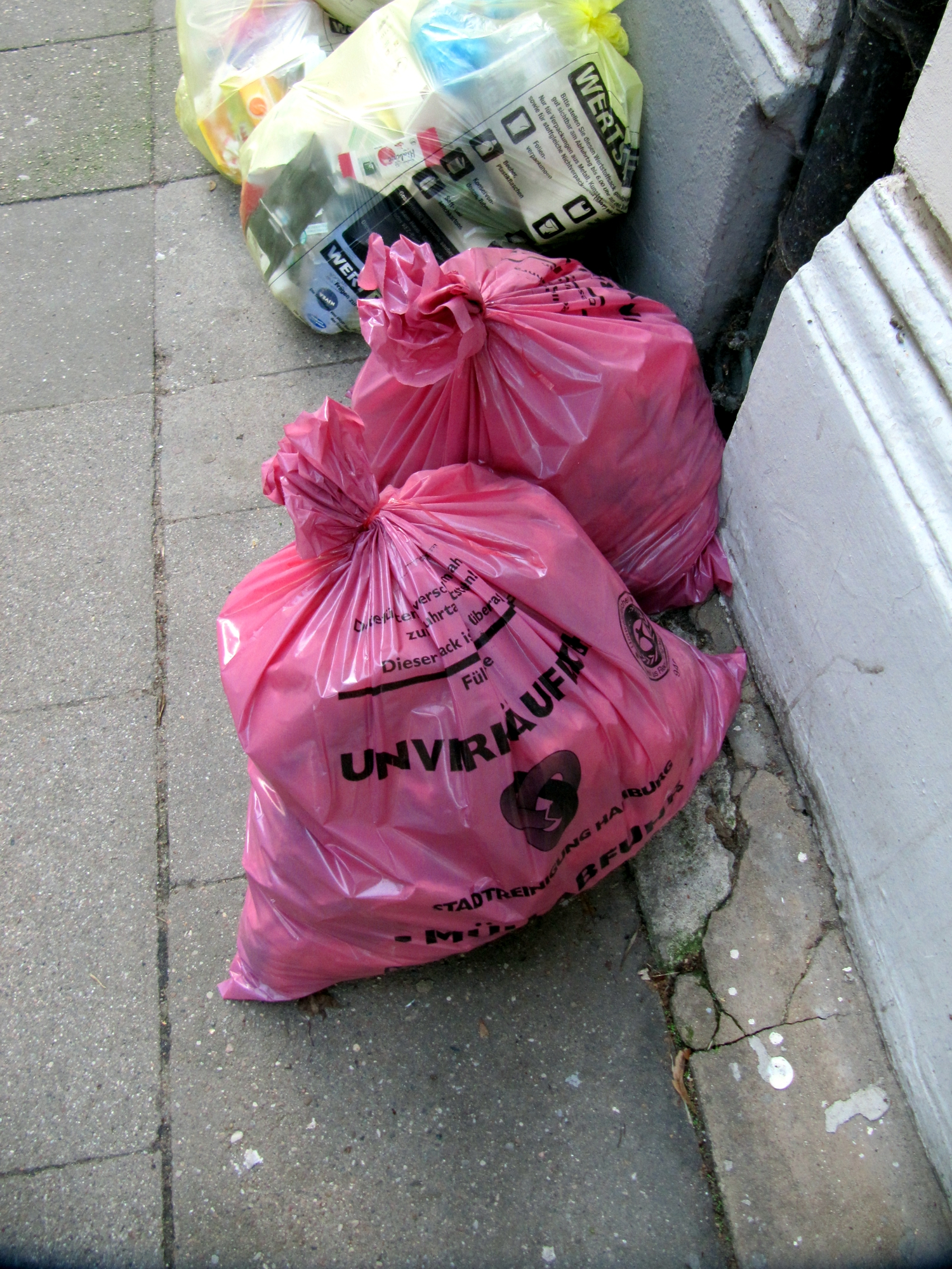 Hamburg (Bezirk Altona), Sackabfuhr (Aug. 2016)